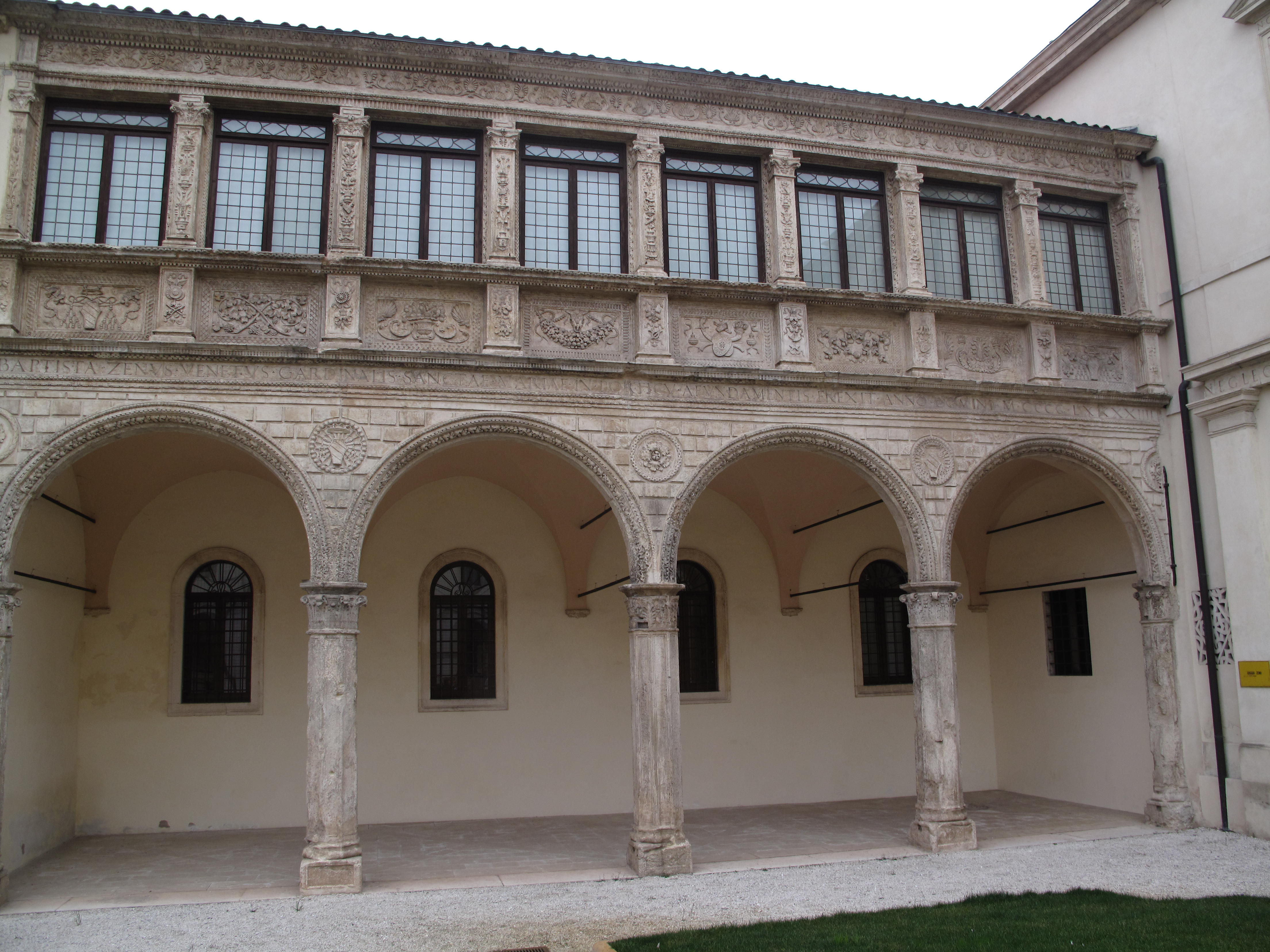 Vescovado di Vicenza - Loggia Zeno